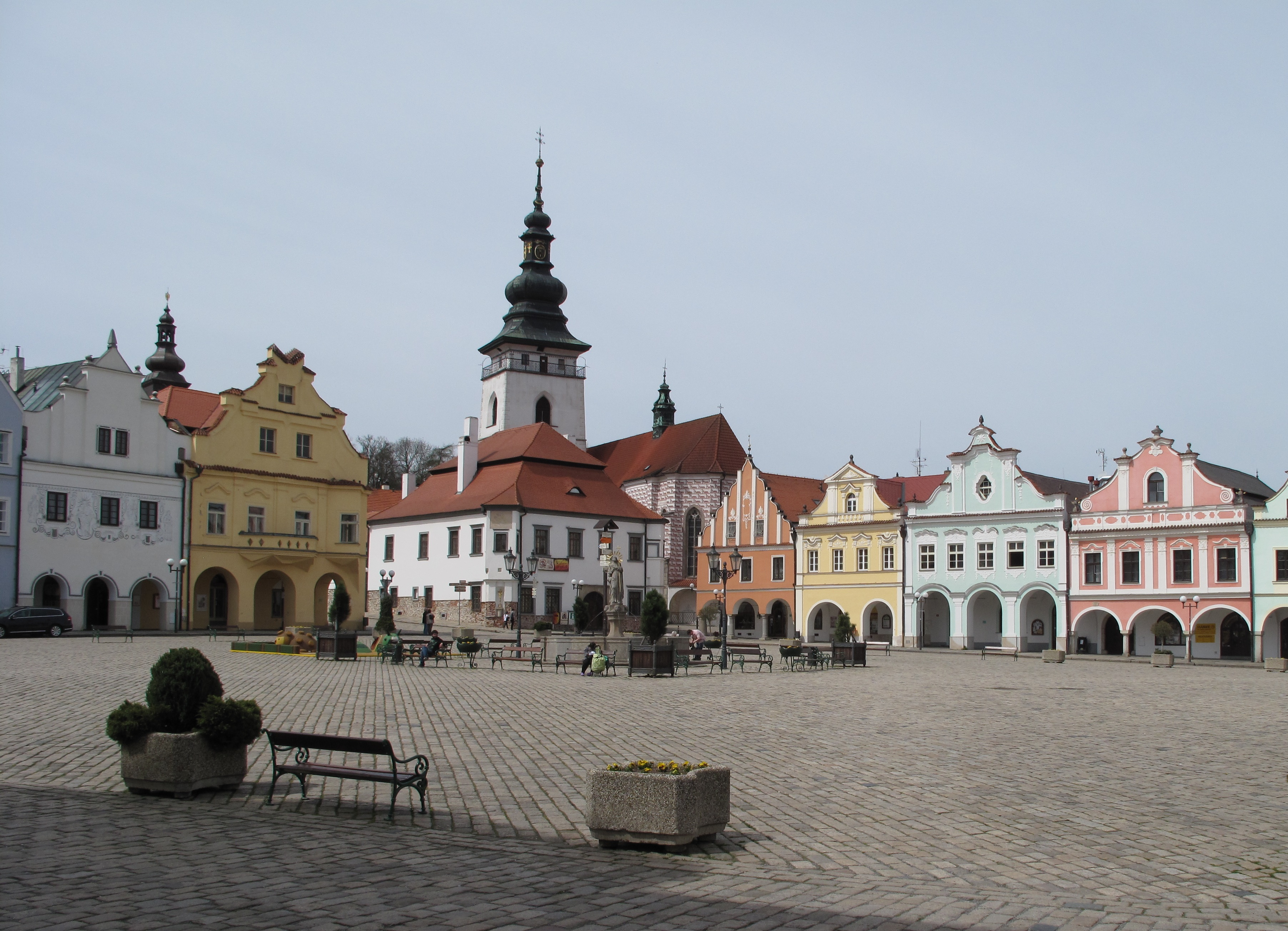 Pelhřimov. Okres Pelhřimov, Česká republika.